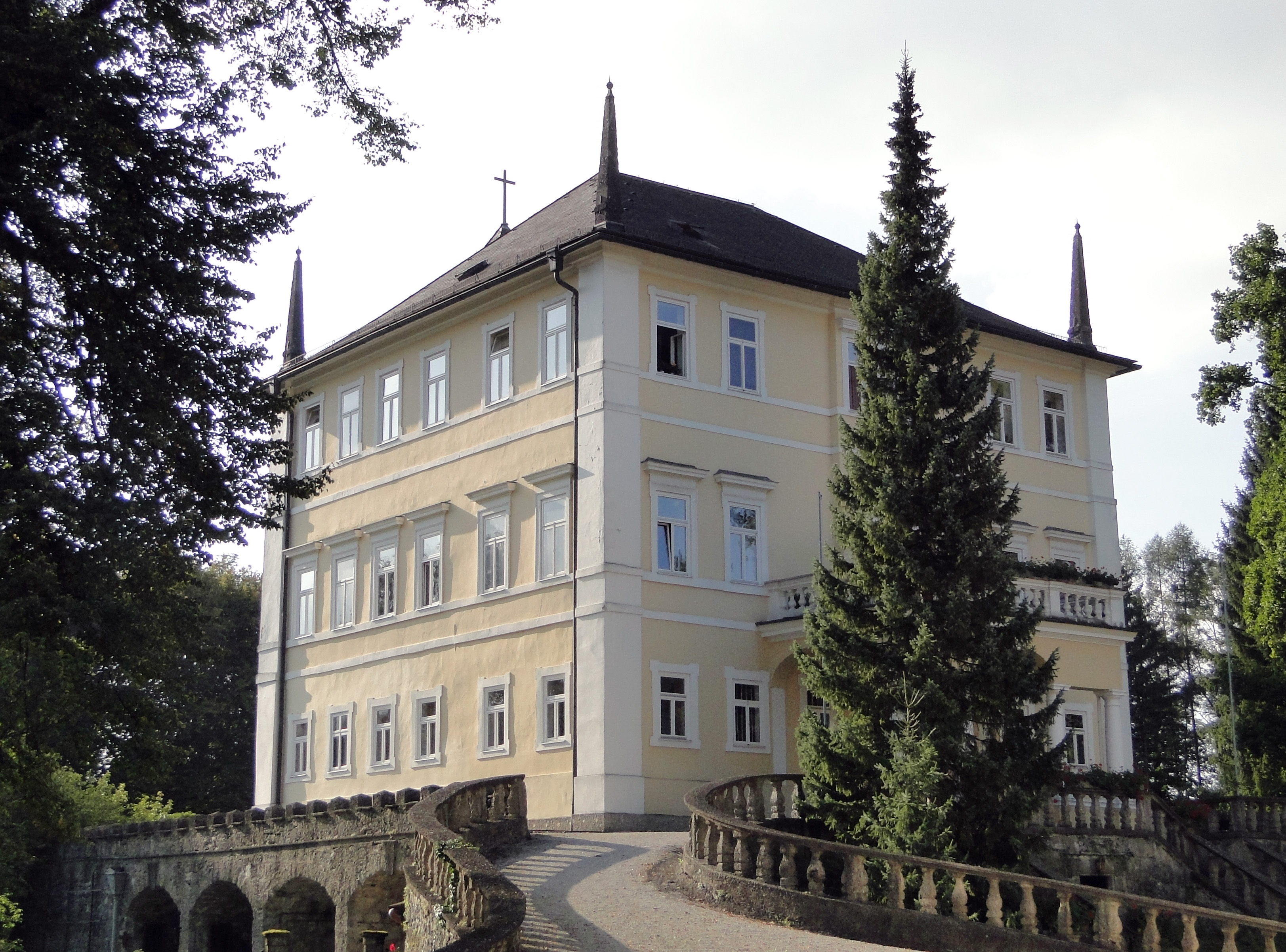 Schloss Emsburg (Kreuzhofschloss) mit Inventar